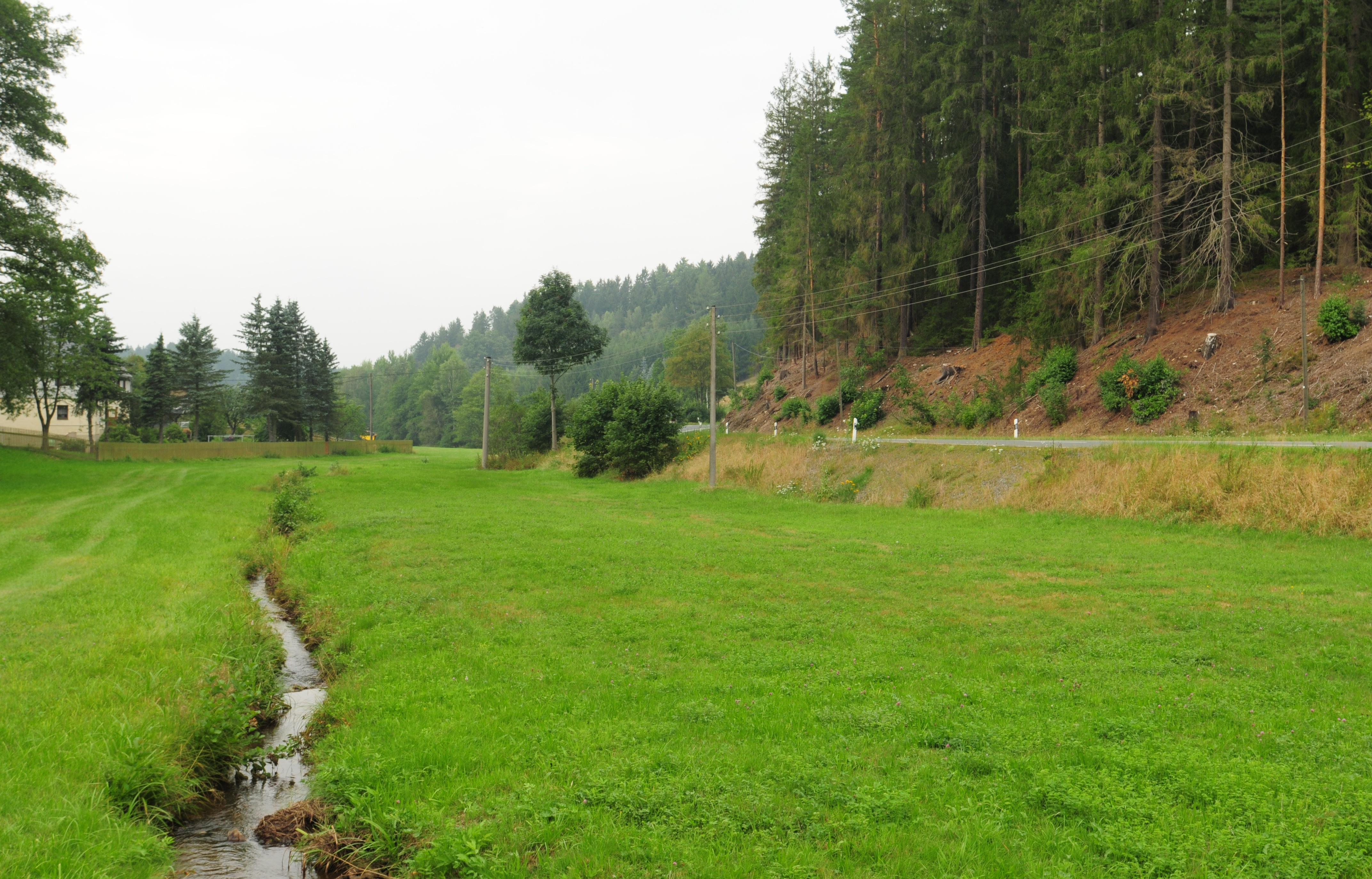 Bad Brambach: Verlauf des Rauner Bachs im Rauner Grund, Blick talwärts (Vogtlandkreis, Freistaat Sachsen, Deutschland)